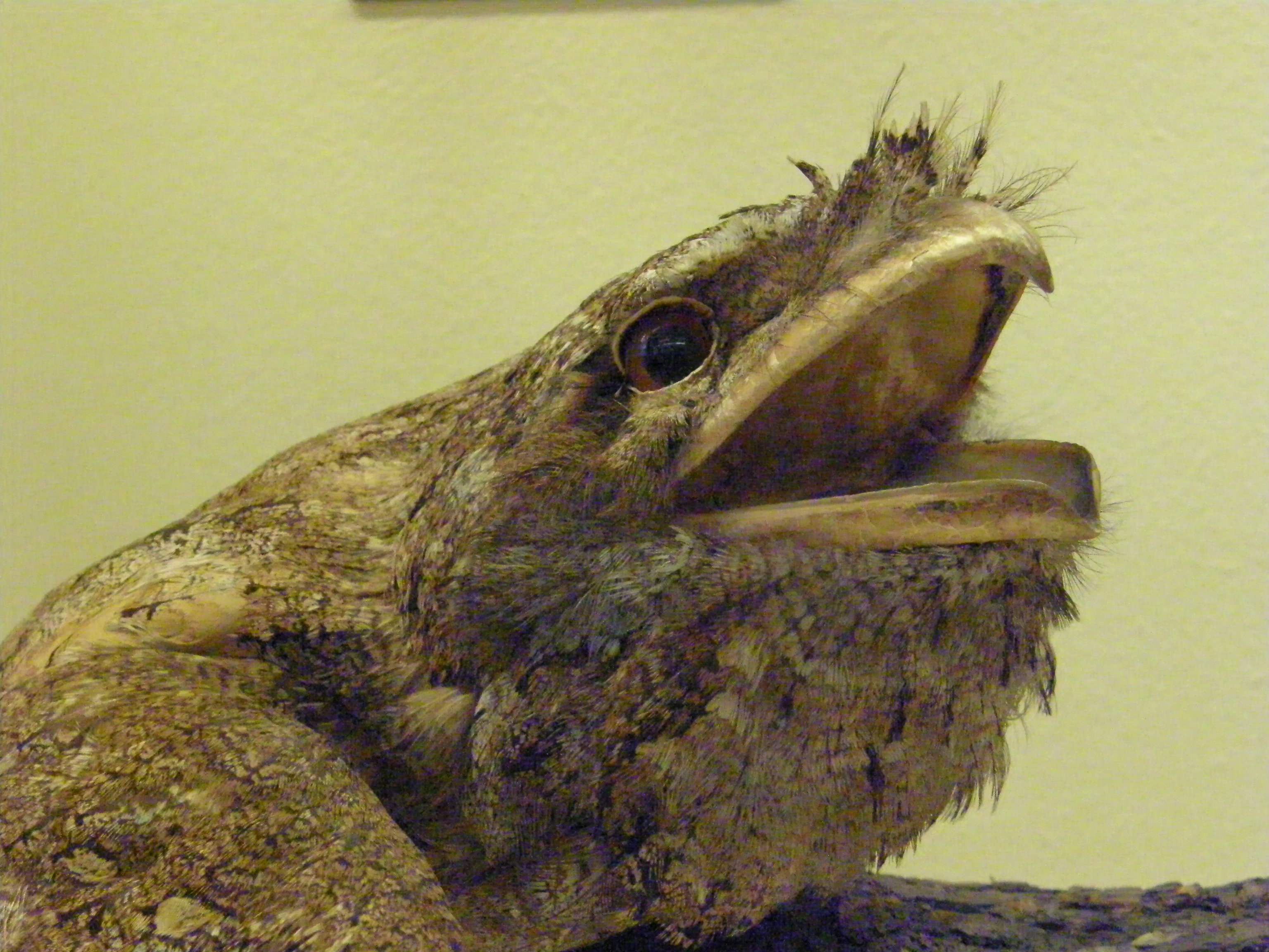 Papuan Frogmouth - Podargus papuensis